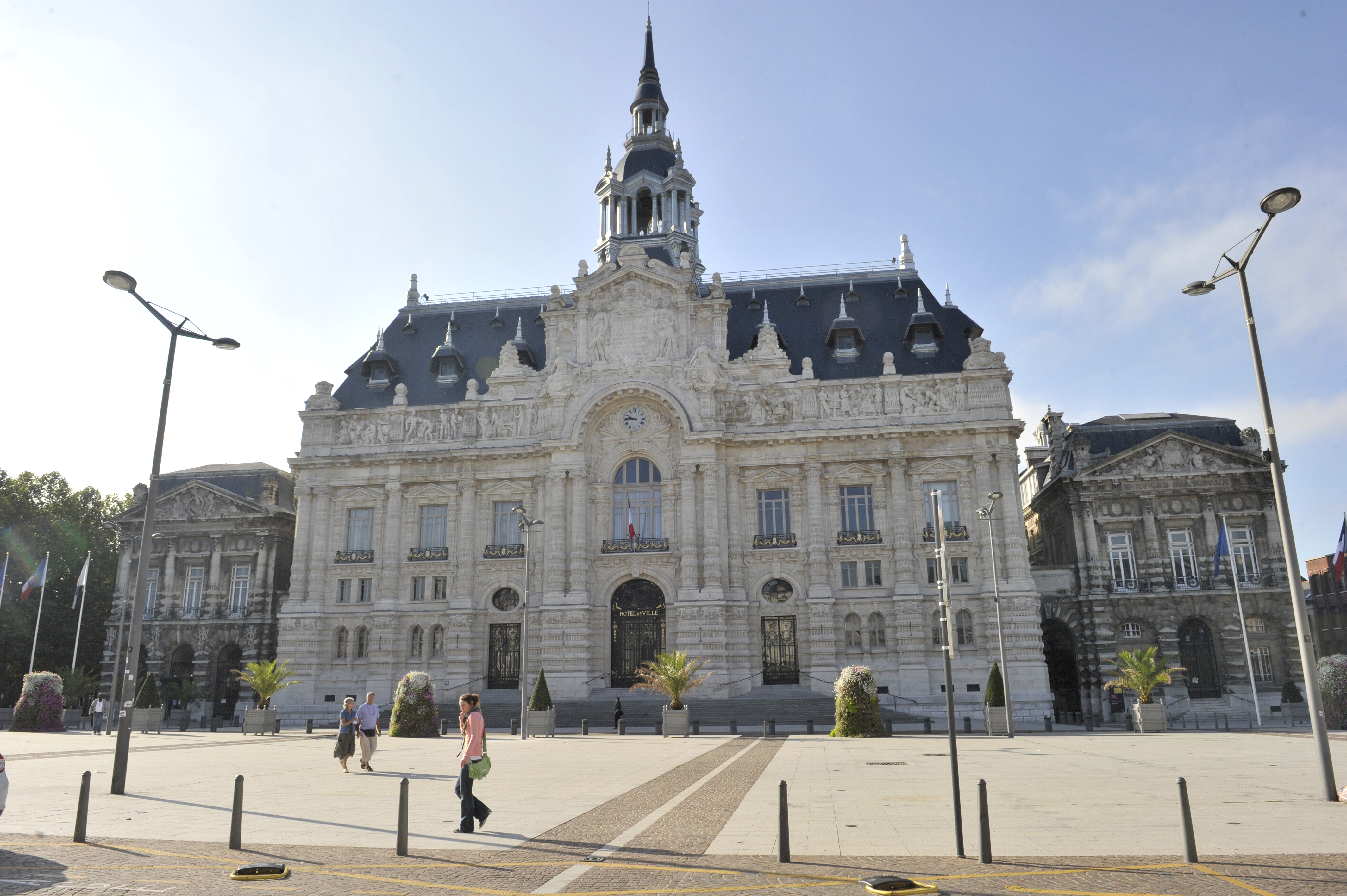 façade de la mairie et grand'place